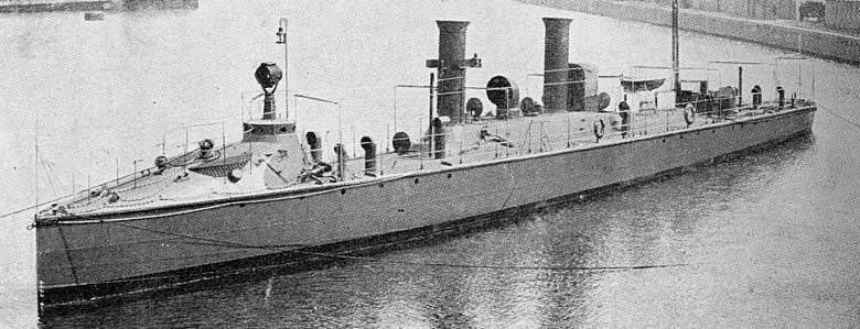 A Torpedeira Goyaz fundeada (foto: Jane's Fightning Ships, via P Caminha) Fonte: NGB